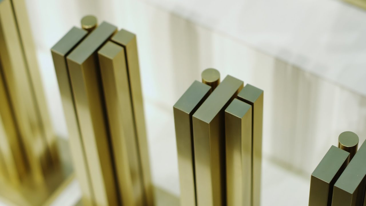 If award